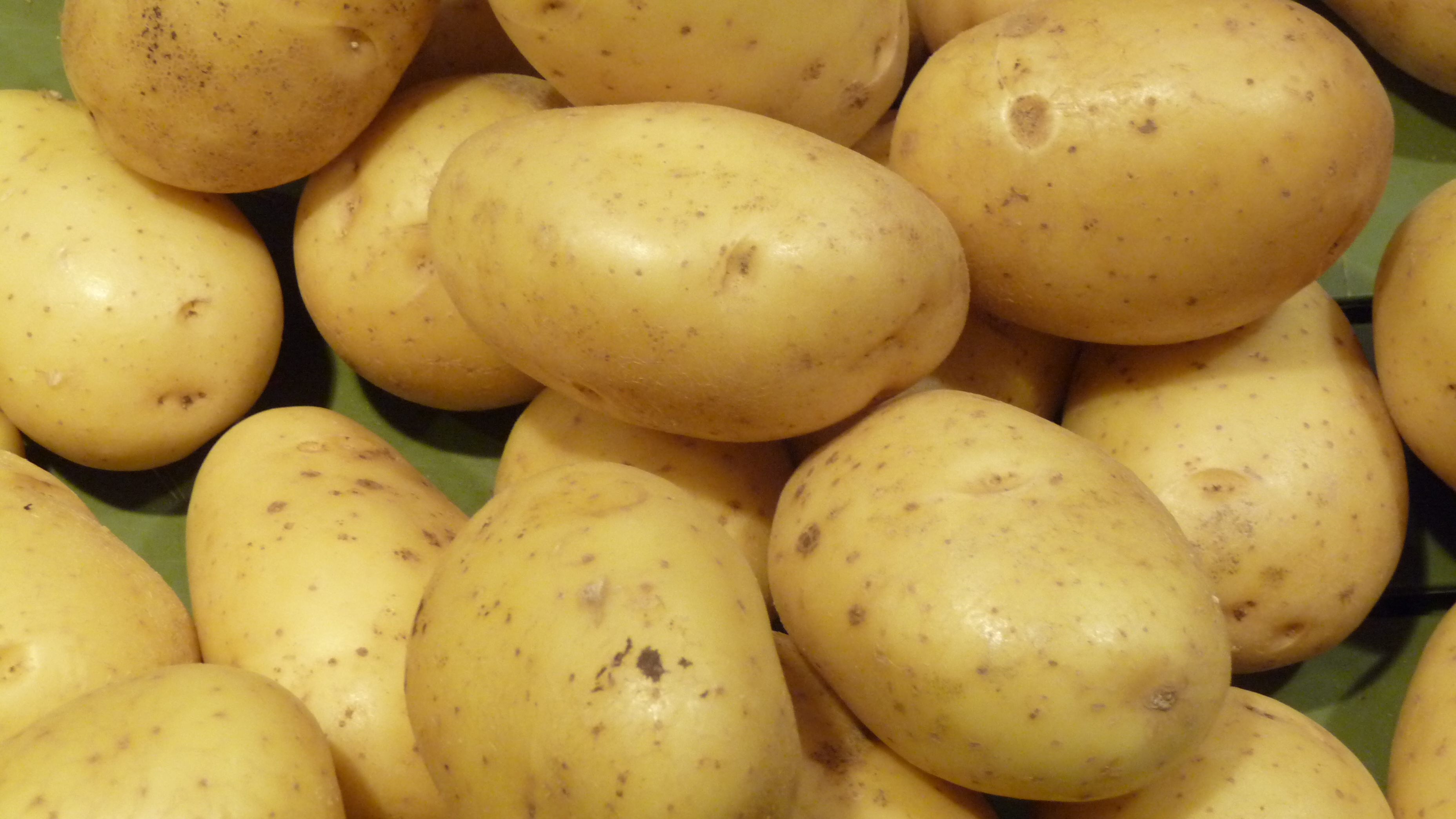 variété de pomme de terre 'Monalisa'